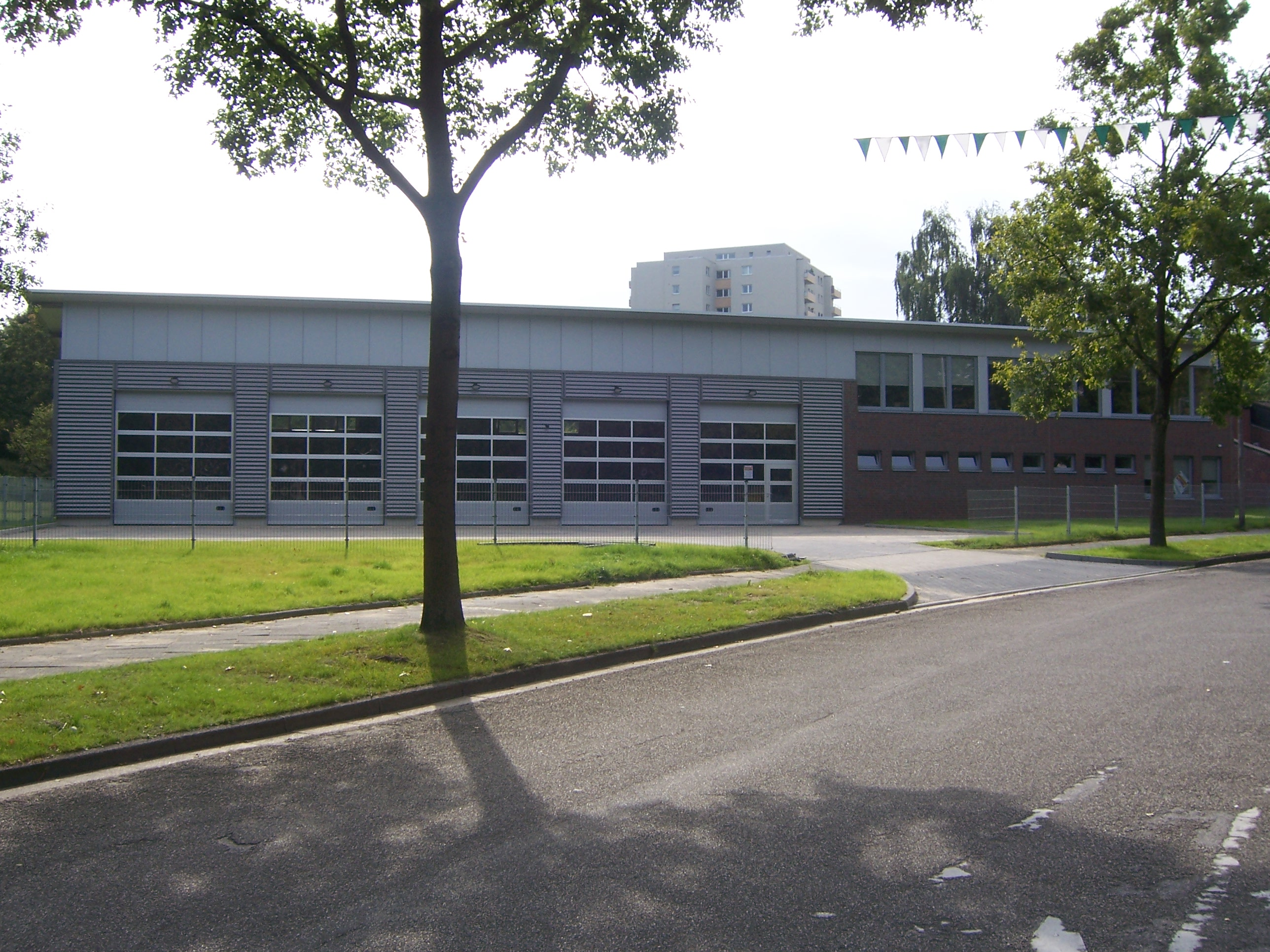 Feuerwehrgerätehaus Viersen-Süd, Berliner Höhe 2, 41748 Viersen im August 2007 kurz bevor es in Dienst gestellt wurde